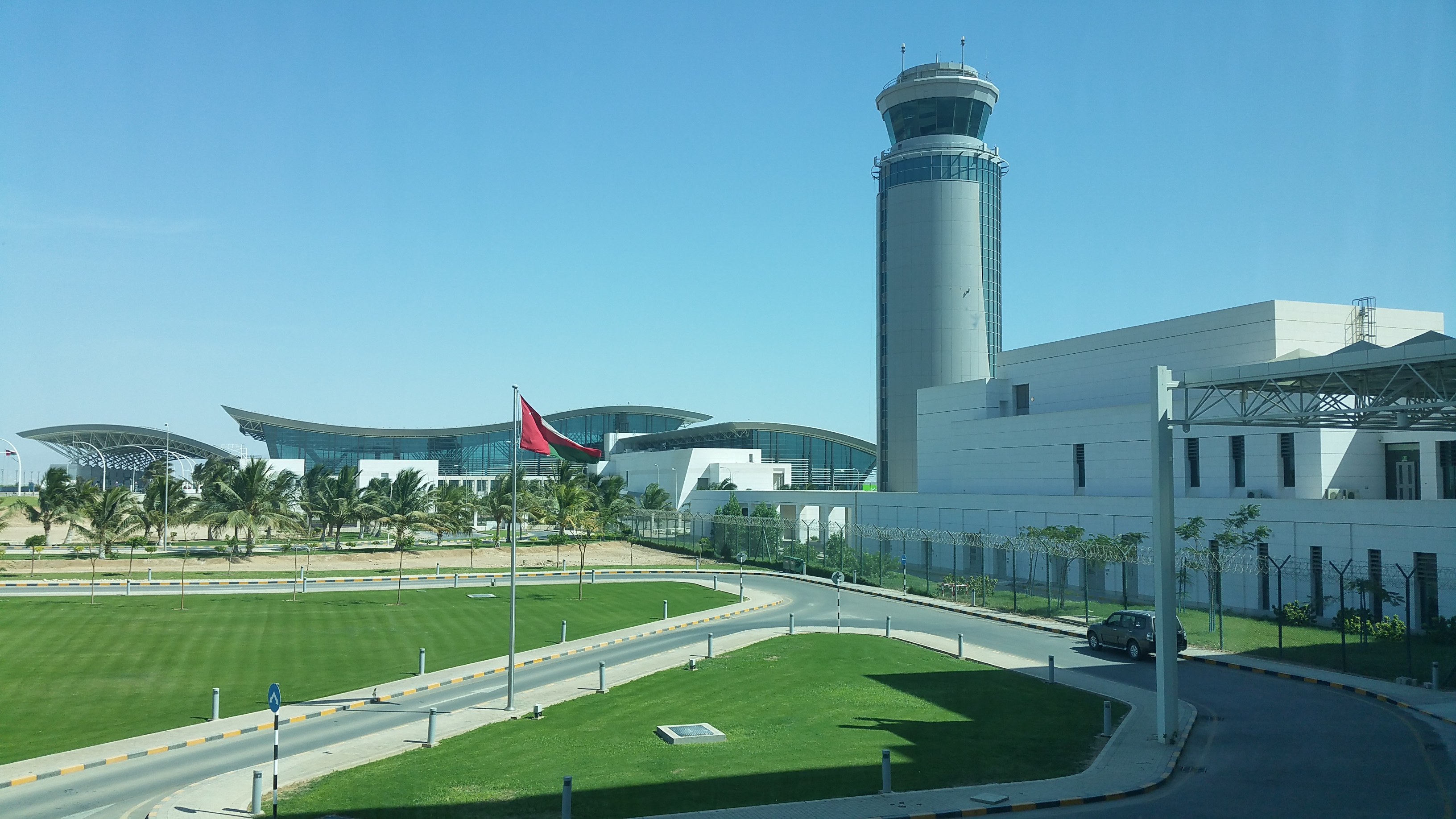 Neuer Tower